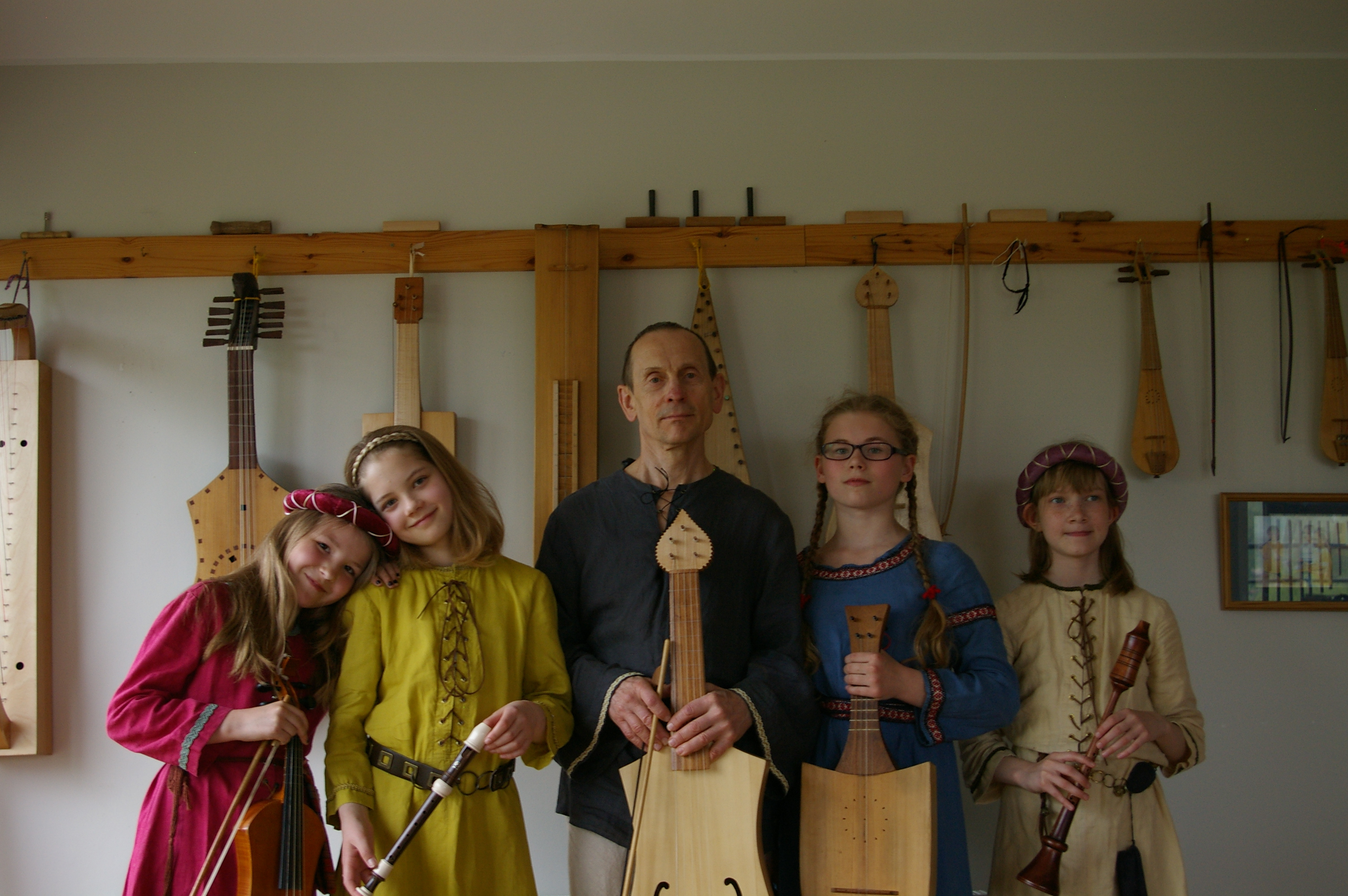 Muusikaõpetaja Tõnu Sepp stuudio Vaikuse Muusika lastega